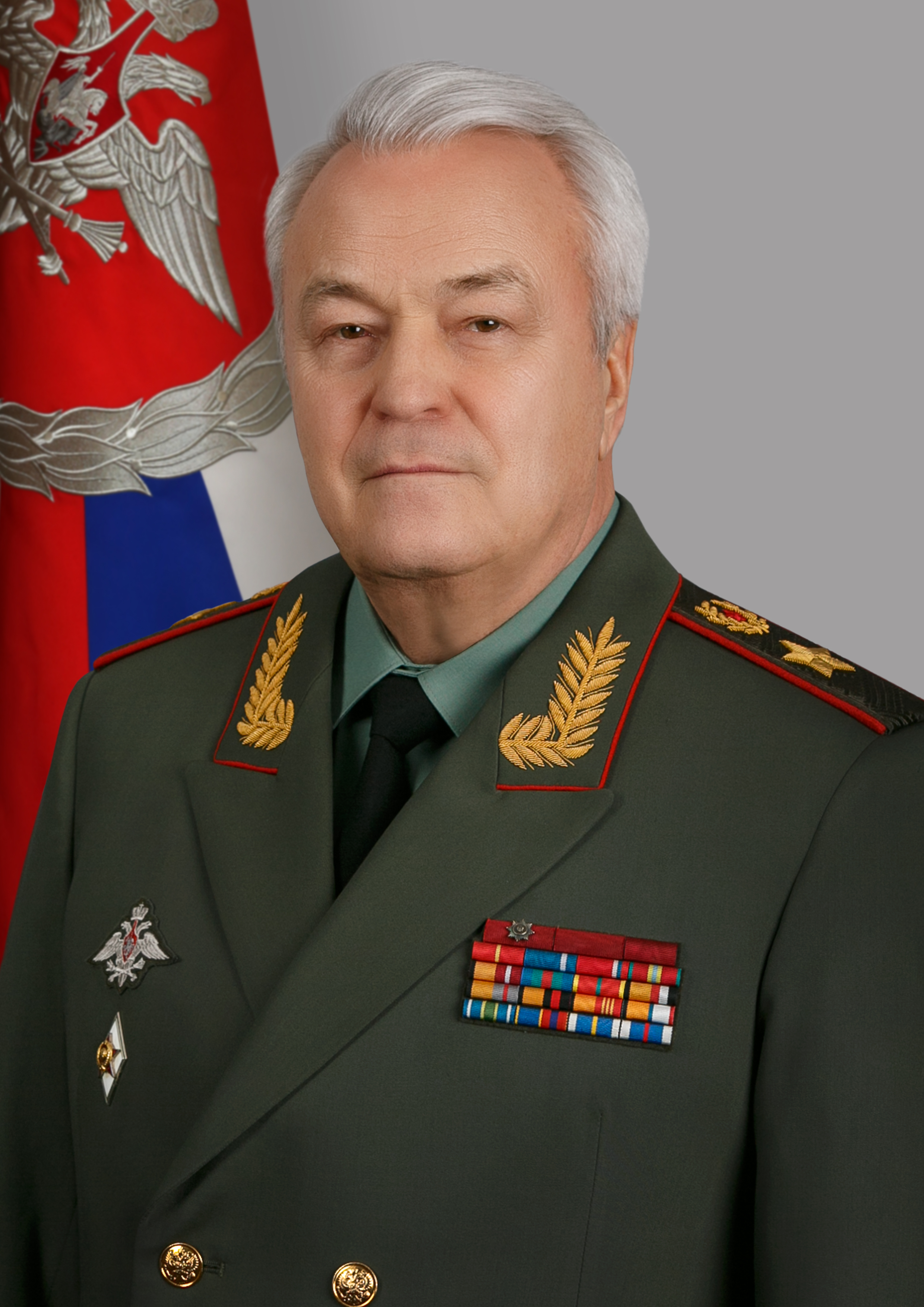 Статс-секретарь – заместитель Министра обороны Российской Федерации Панков Николай Александрович